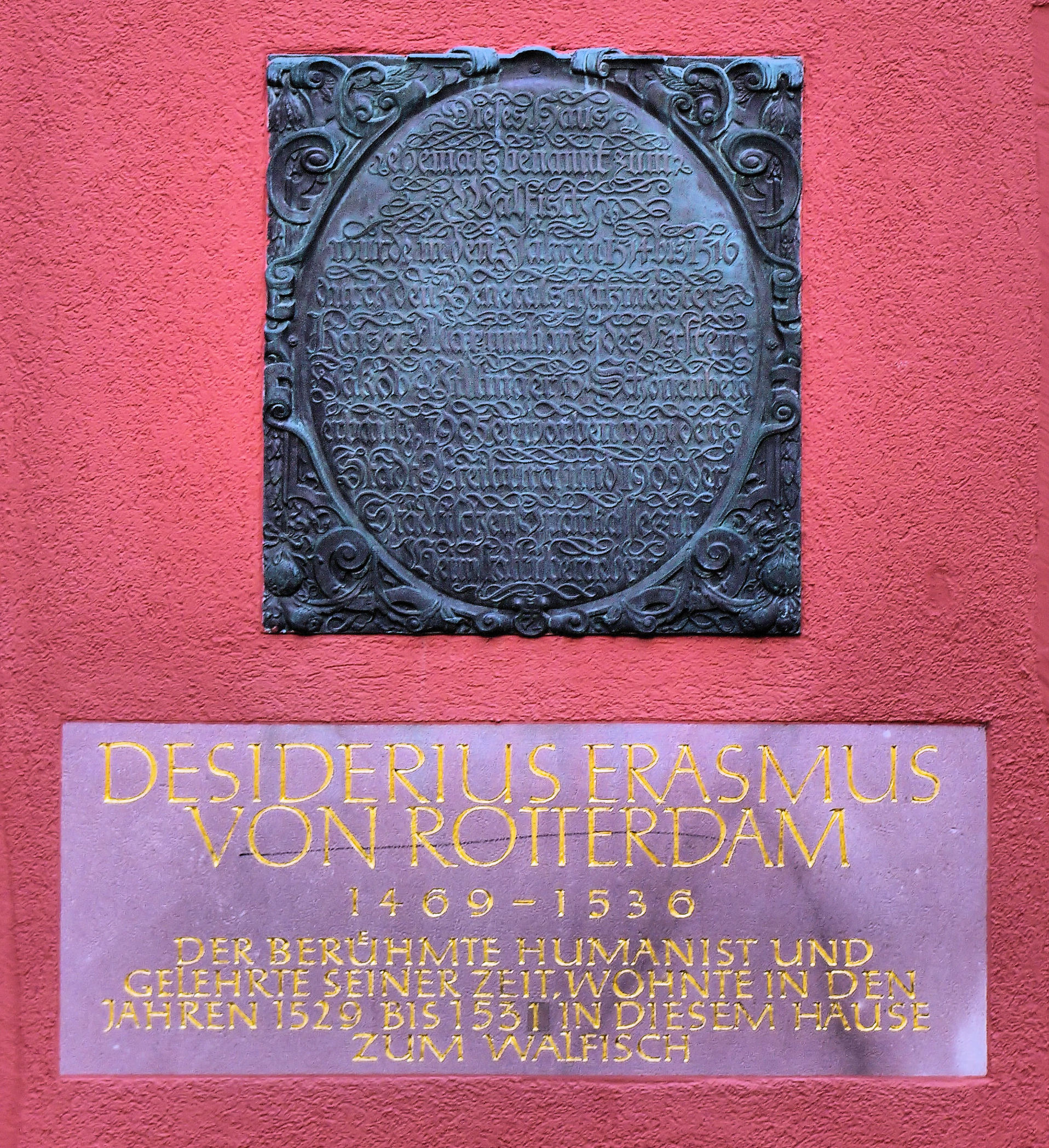 Historische Häuser in Freiburg